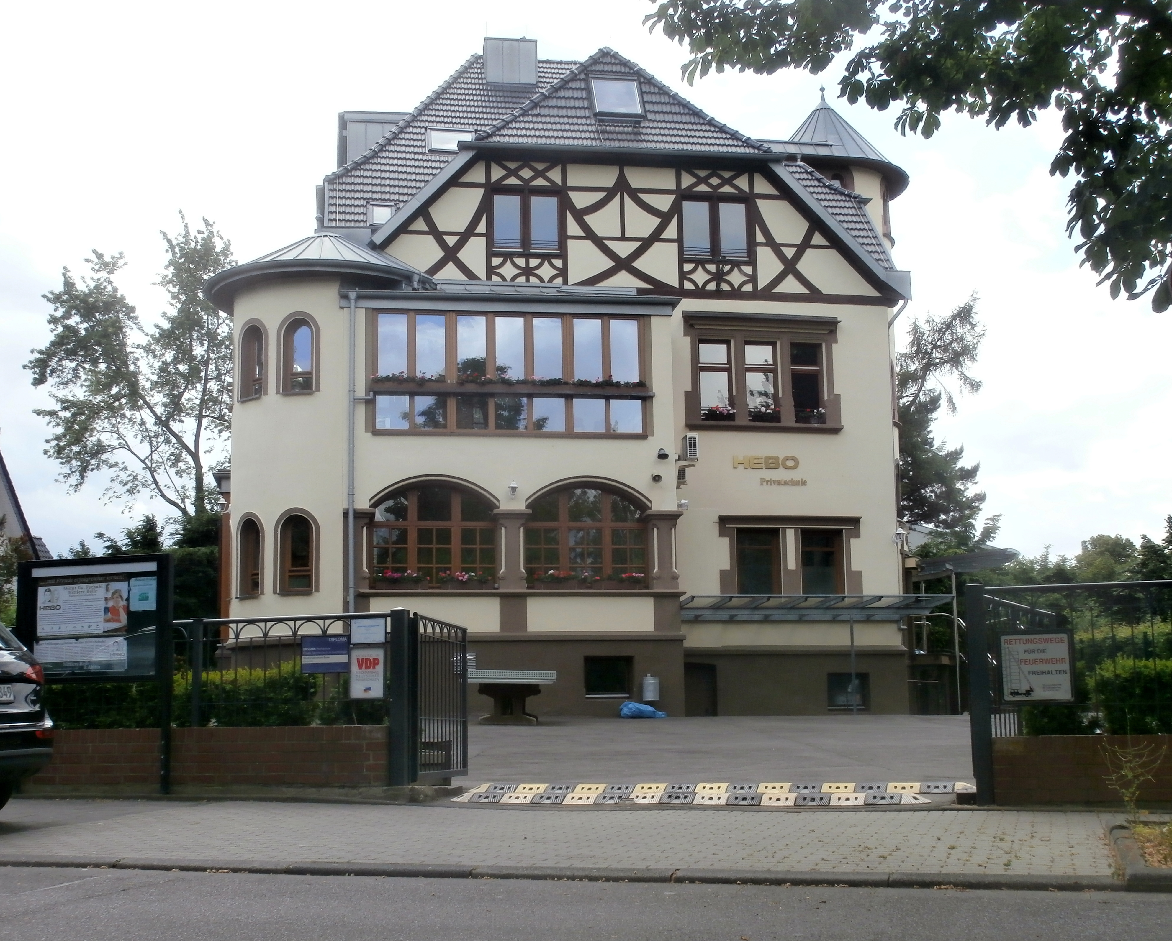 Ehemalige Schule der britischen Botschaft, Am Büchel 100, Bad Godesberg